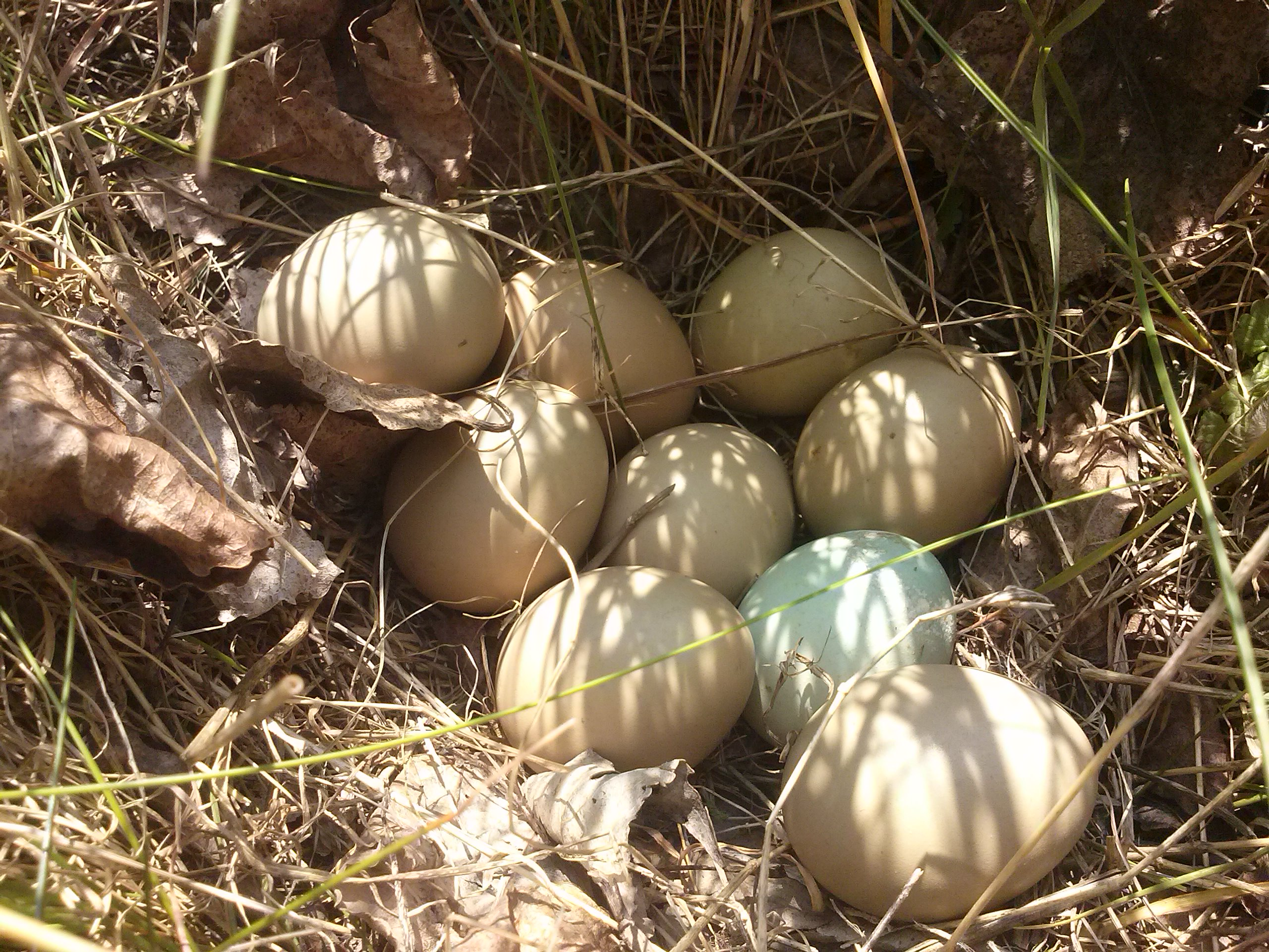 Gniazdo Bażanta z jajkami (na stanowisku przyrodniczo chronionym).